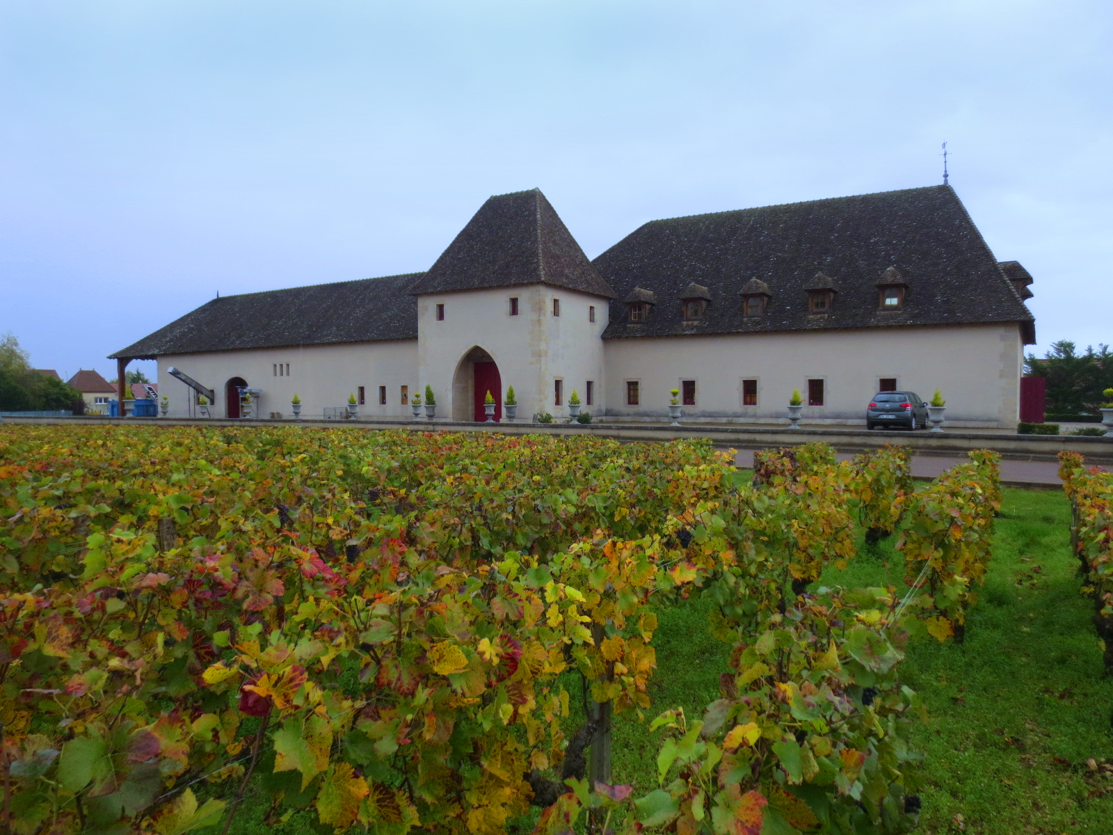 Château de Marsannay